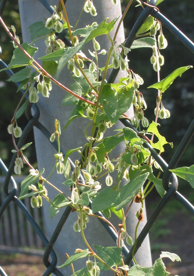 zelfgemaakte foto van Heggeduizendknoop Fallopia dumetorum; begin september